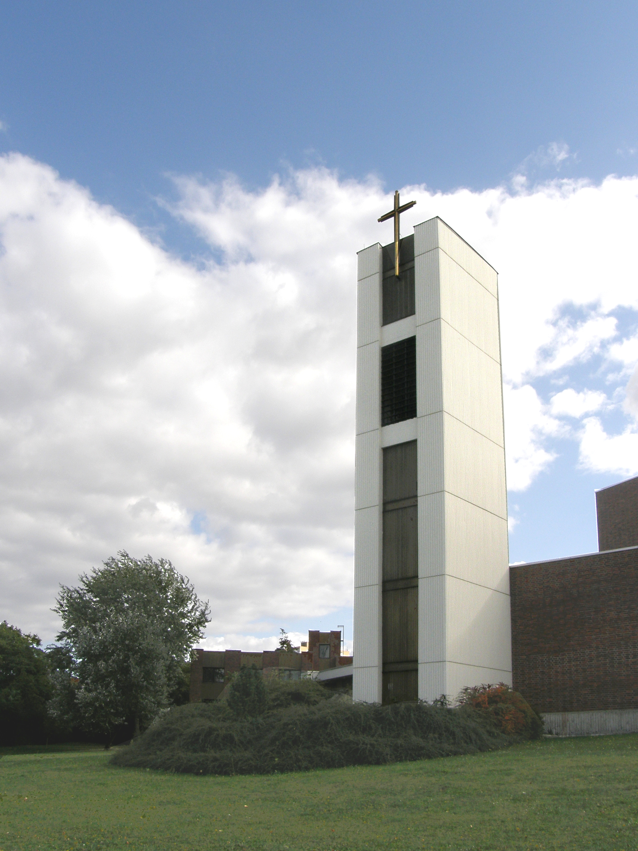 Kirche in Berlin-Marzahn, Glockenturm